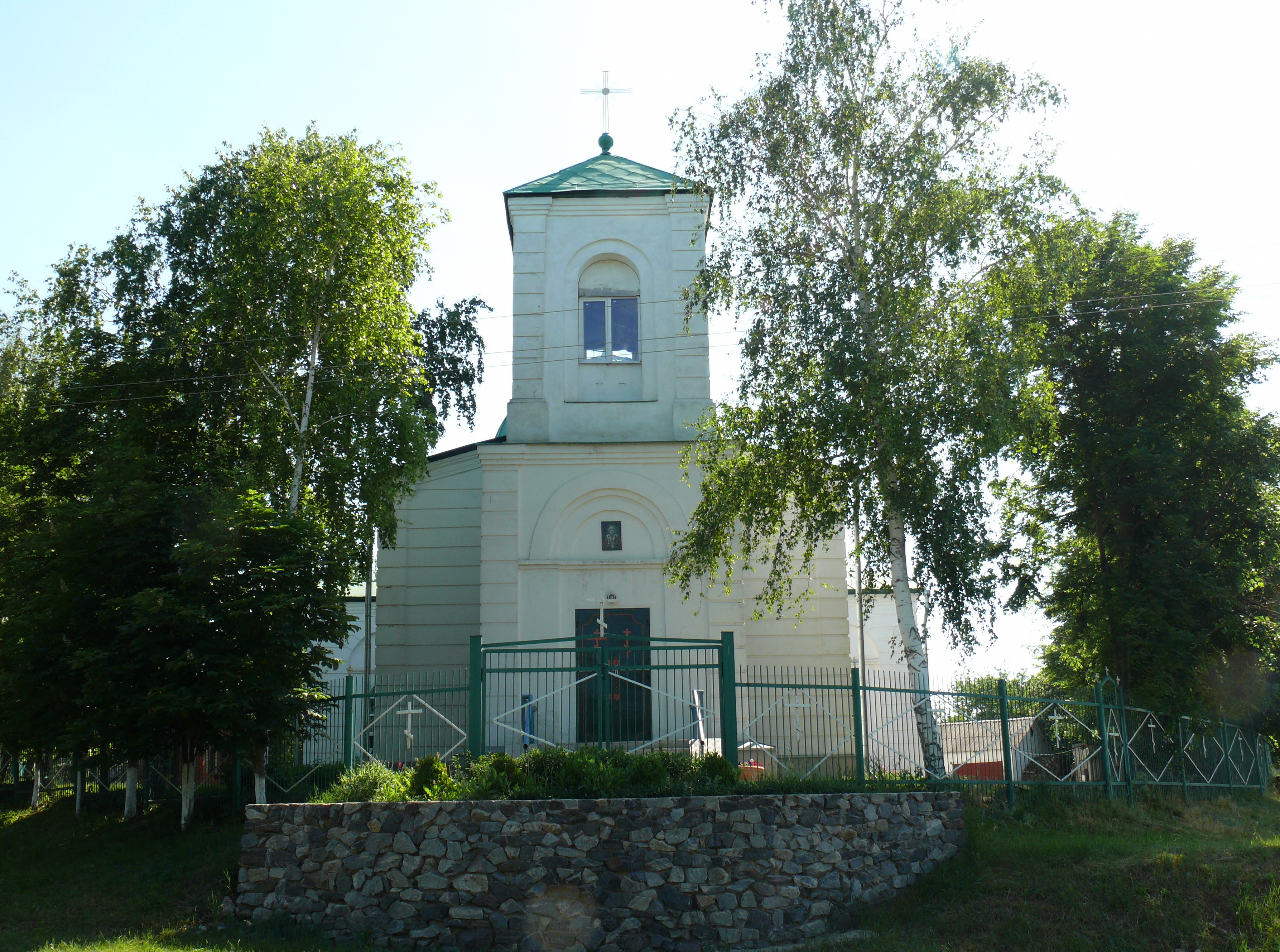 Храм в селе Высокополье